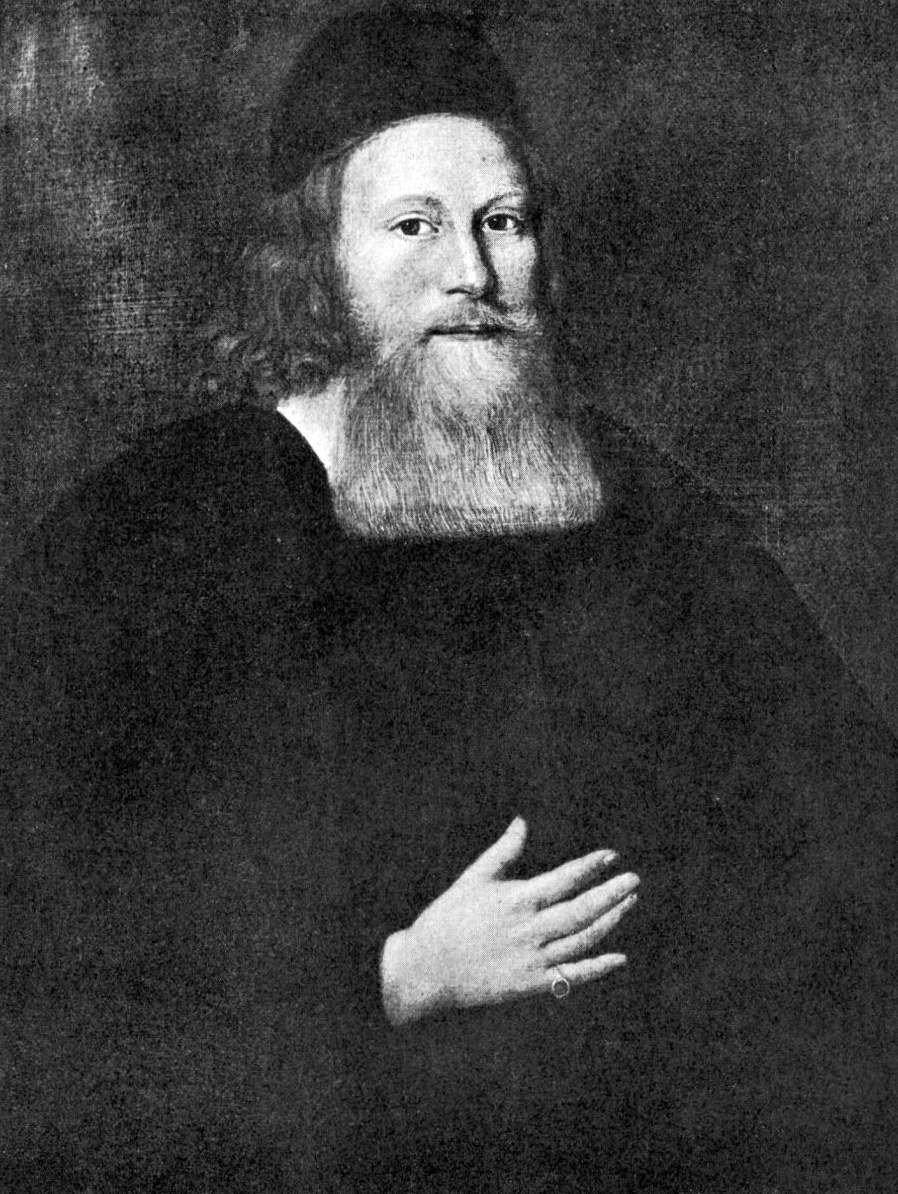 Georg Wallin den äldre (1644–1723).